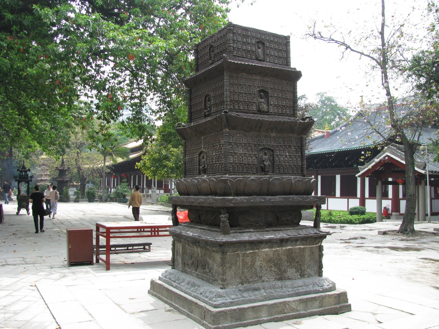 Guangxiao Si Guangzhou, China.中国广州光孝寺铁塔。